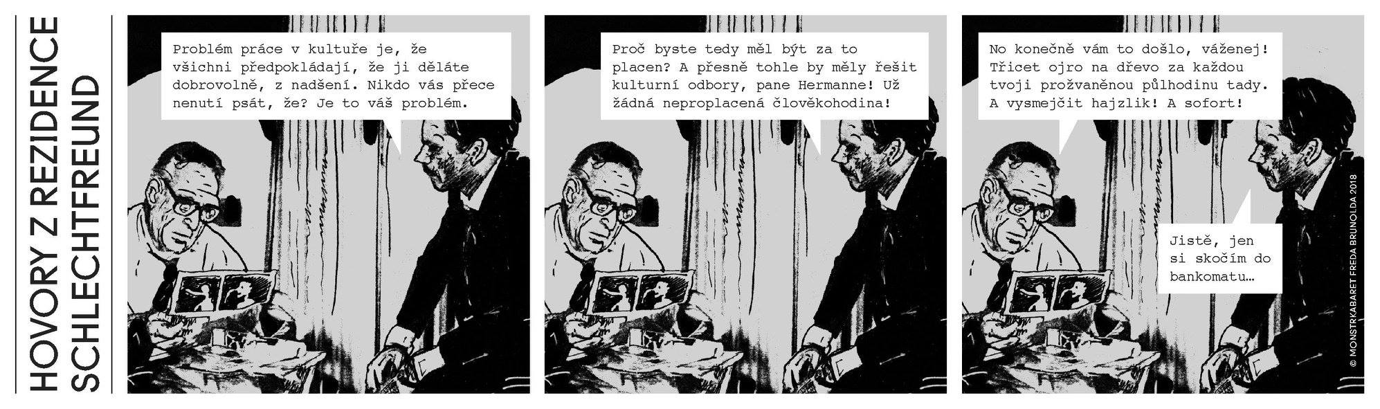 Na poslední straně A2 vychází komiks Hovory z Rezidence Schlechtfreund